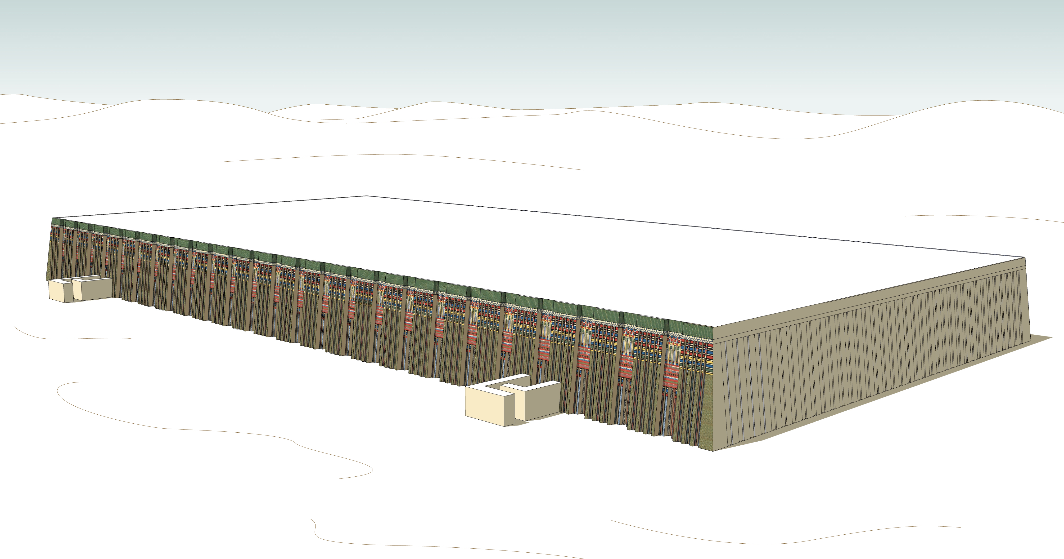 Reconstitution du mastaba M16 de Néfermaât à Meidoum (Egypte)